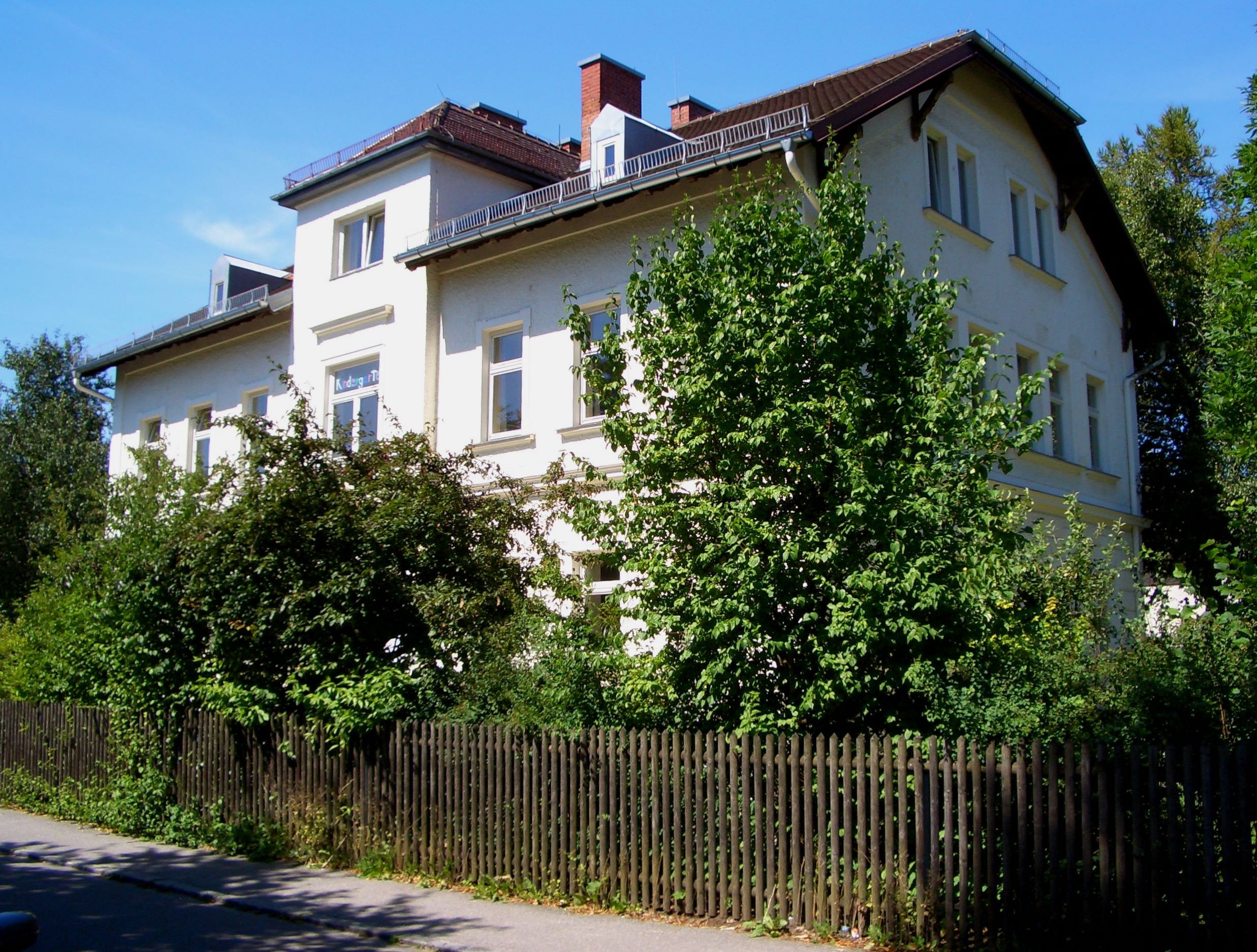 Städtische Kindertagesstätte Schnorr-von-Carolsfeld-Str. 9 München-Englschalking, früher Gemeindeschule erbaut 1896